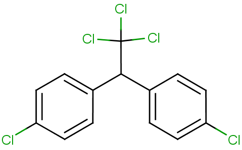 Strukturní­ vzorec DDT